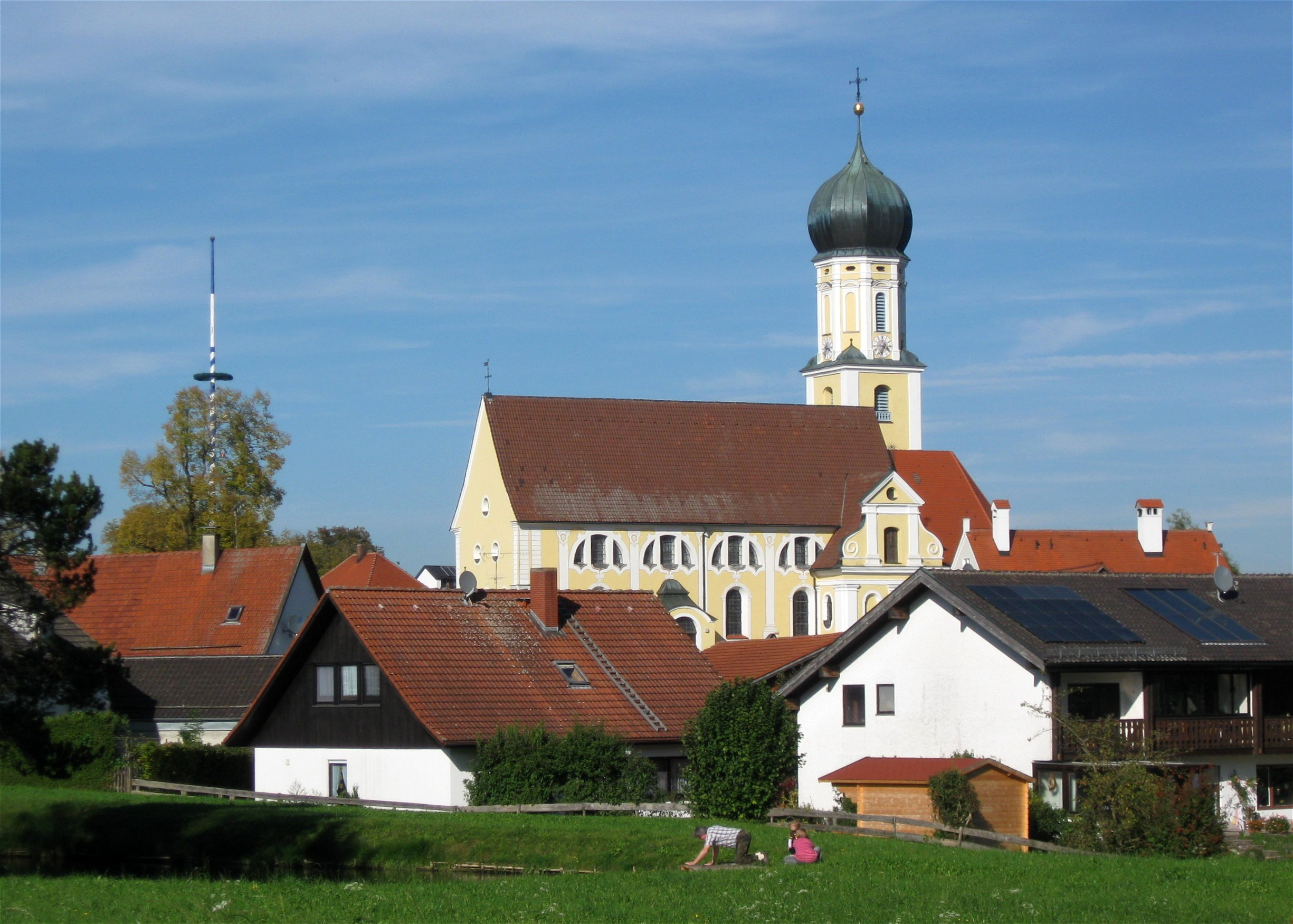 Blick auf Eresing und die Pfarrkirche St. Ulrich